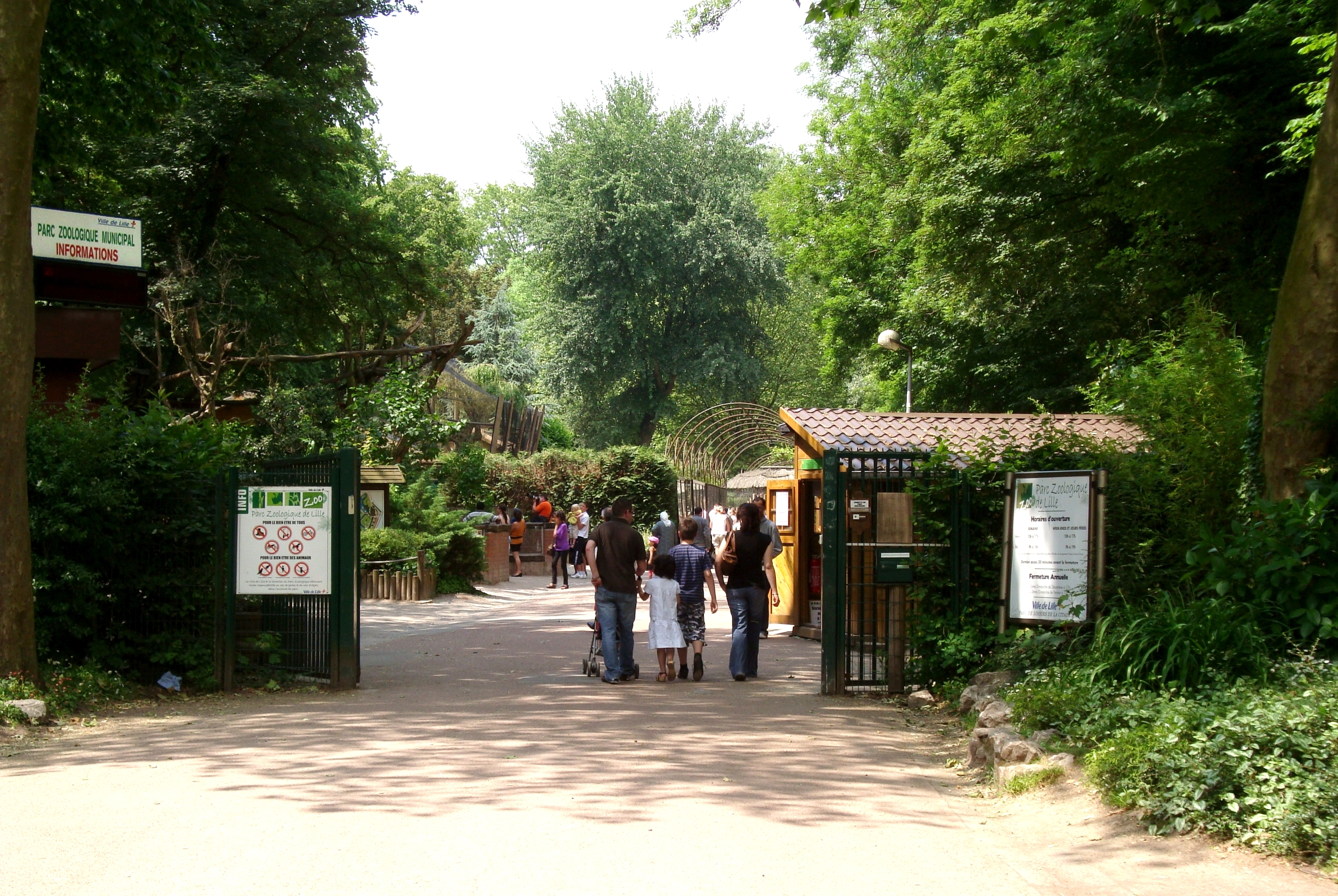 L'entrée du zoo de Lille (Nord).